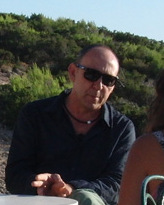 DJ-José Padilla im TV-Interview im Hostal La Torre, Ibiza;07.11 (2011-08-23) JanManu